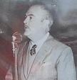 Dr Horacio N.Ferro-Medico-Filantropo-Polotico